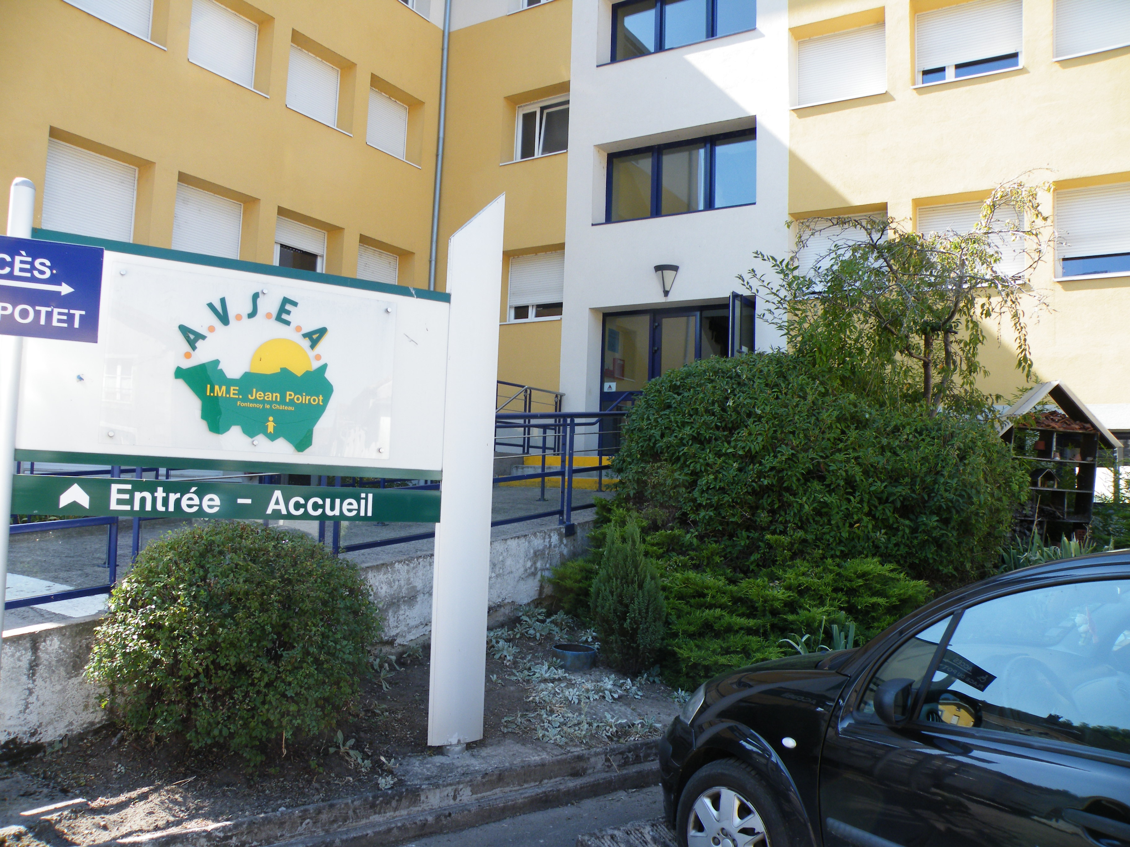 Entrée de l'IME Jean Poirot